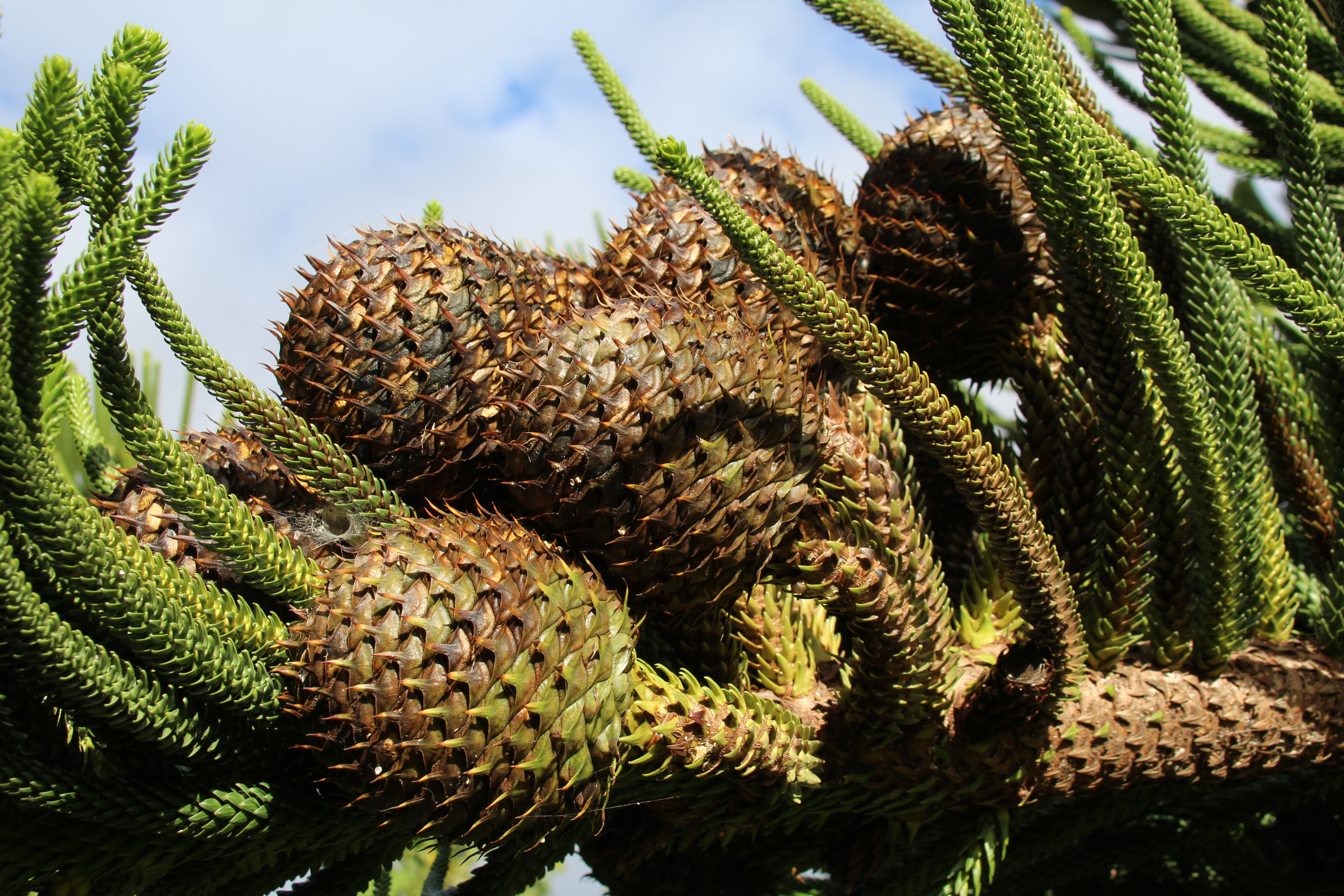 Zapfen von Araucaria heterophylla, Hotelgarten in Estreito da Calheta, Madeira